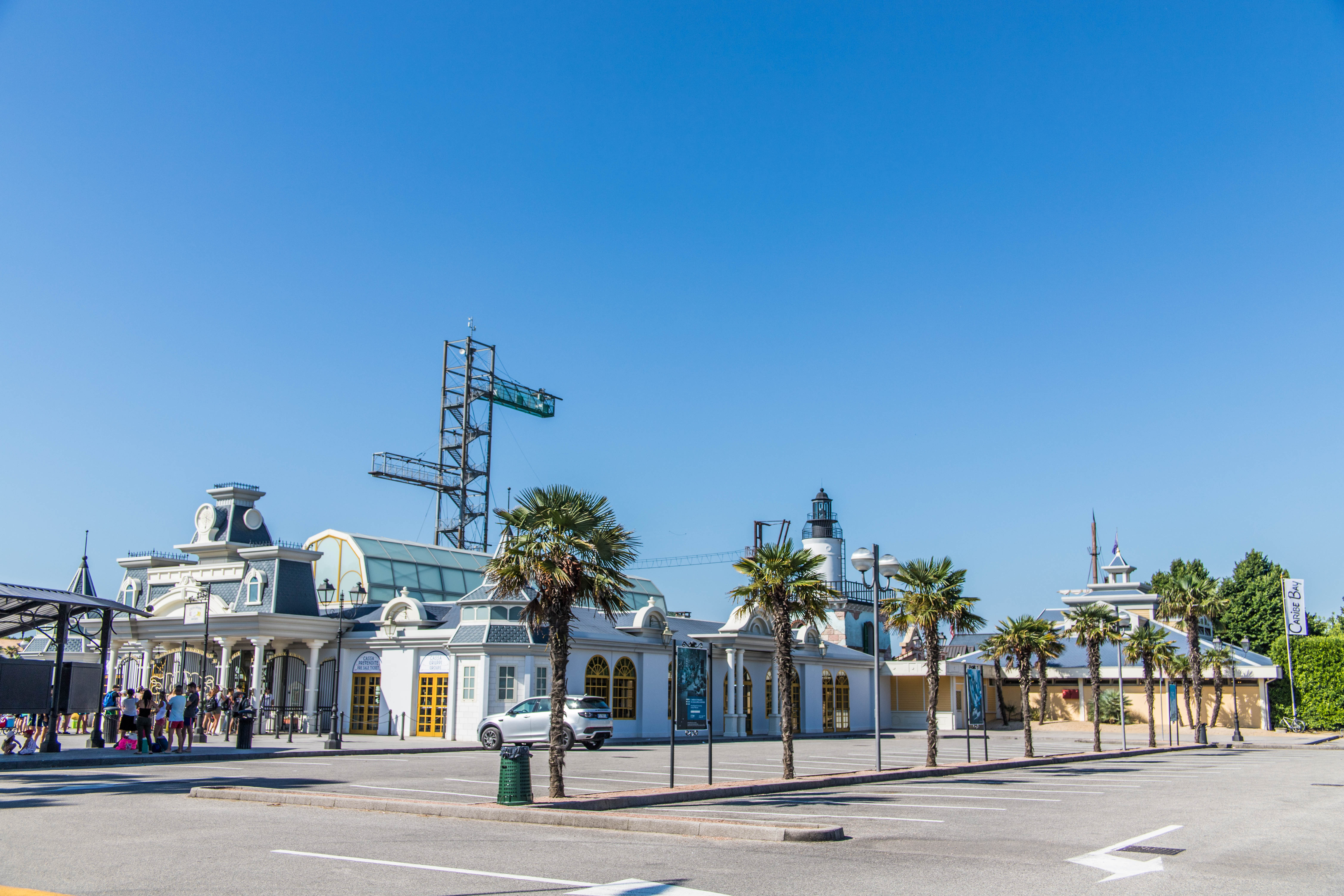 Eingangsbereich des Caribe Bay in Jesolo